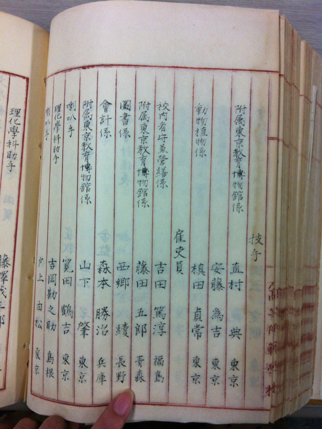 『東京高等師範学校一覧 自明治二十三年四月』藤田五郎の名前